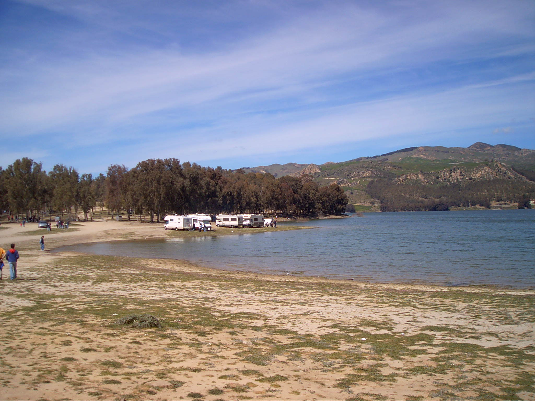 Autore:Emme17